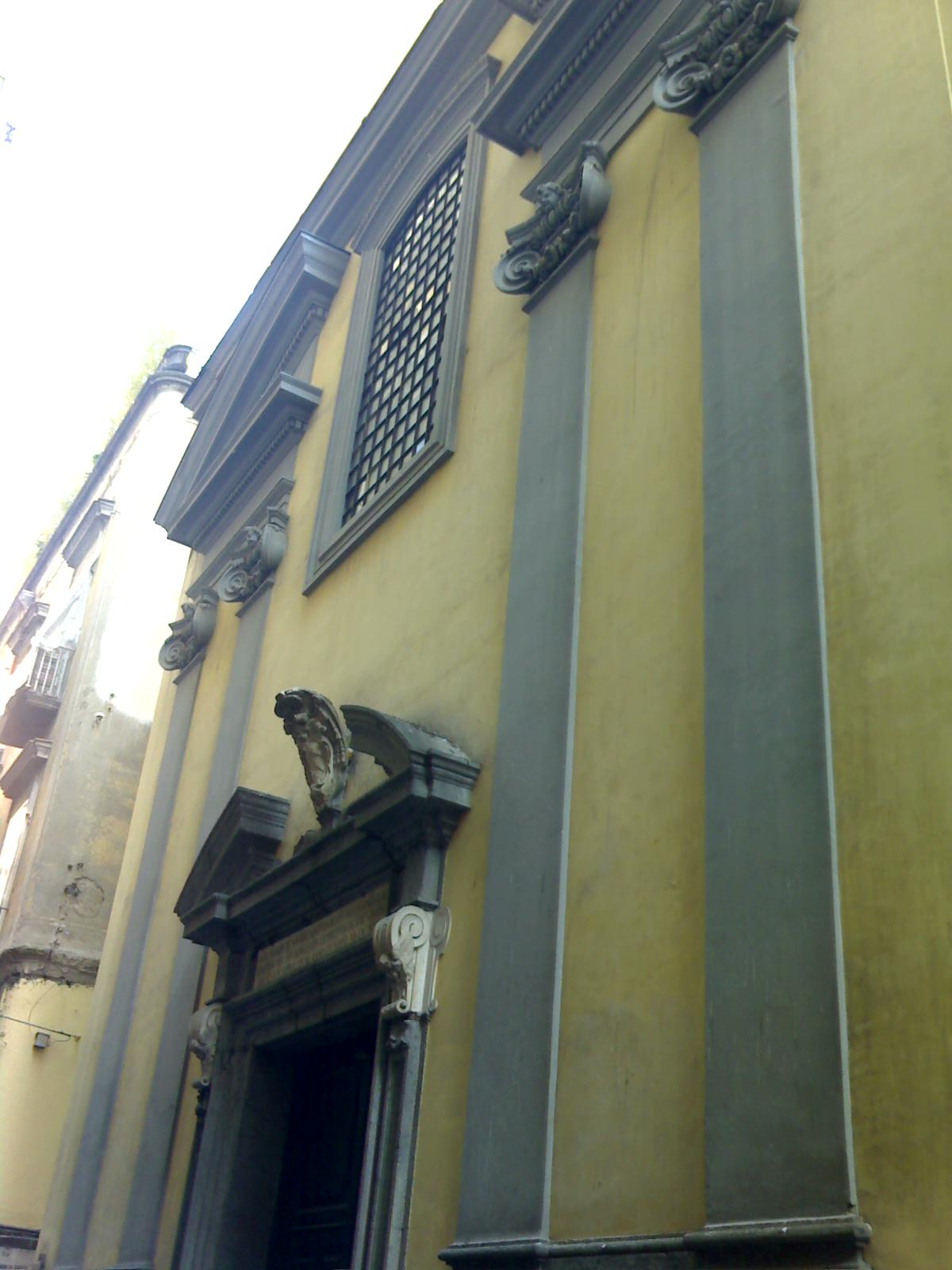 Cappella Sansevero (Napoli)